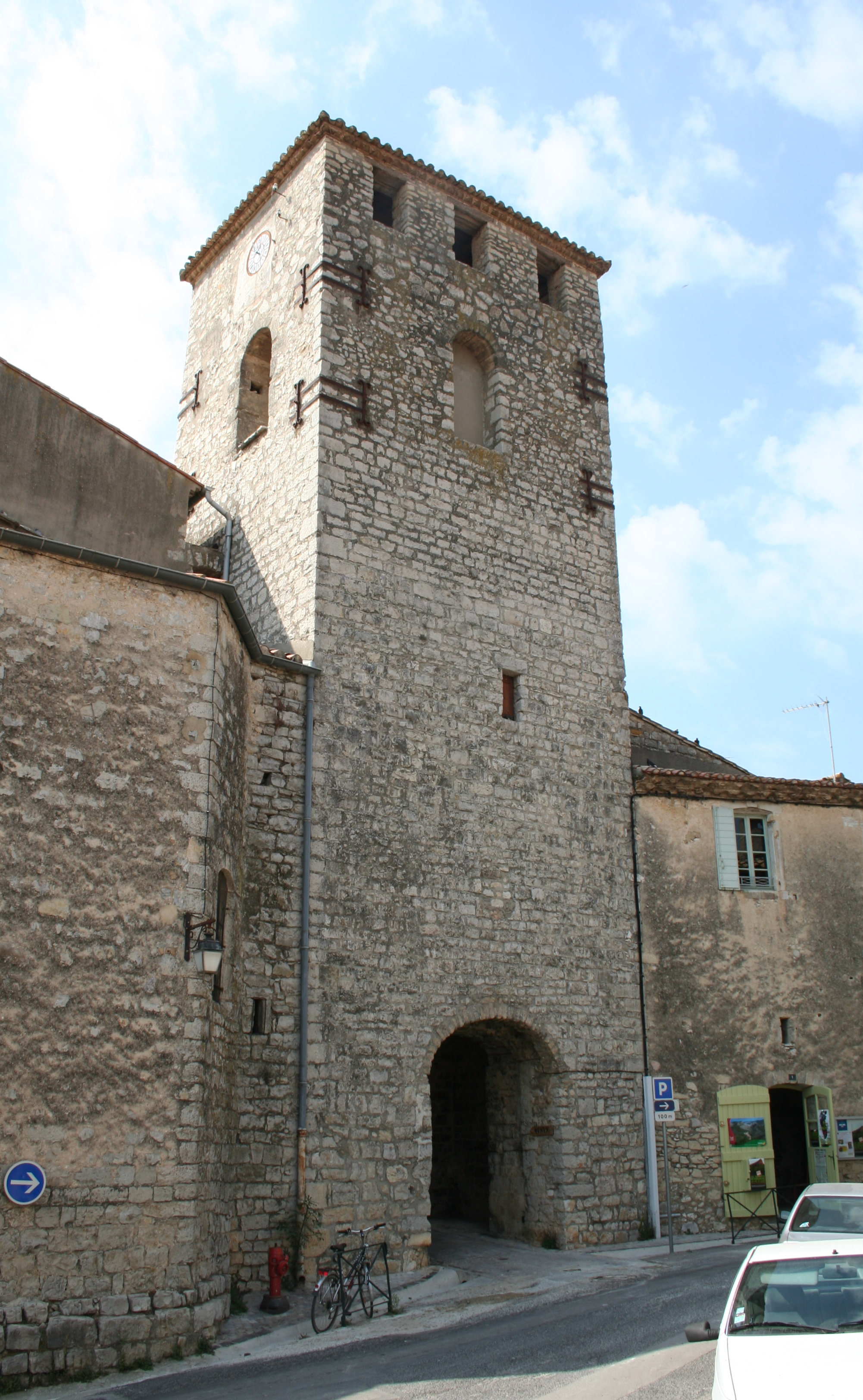 Les Matelles (Hérault) - Tour - clocher de l'église Notre-Dame-de-l'Assomption - porche.